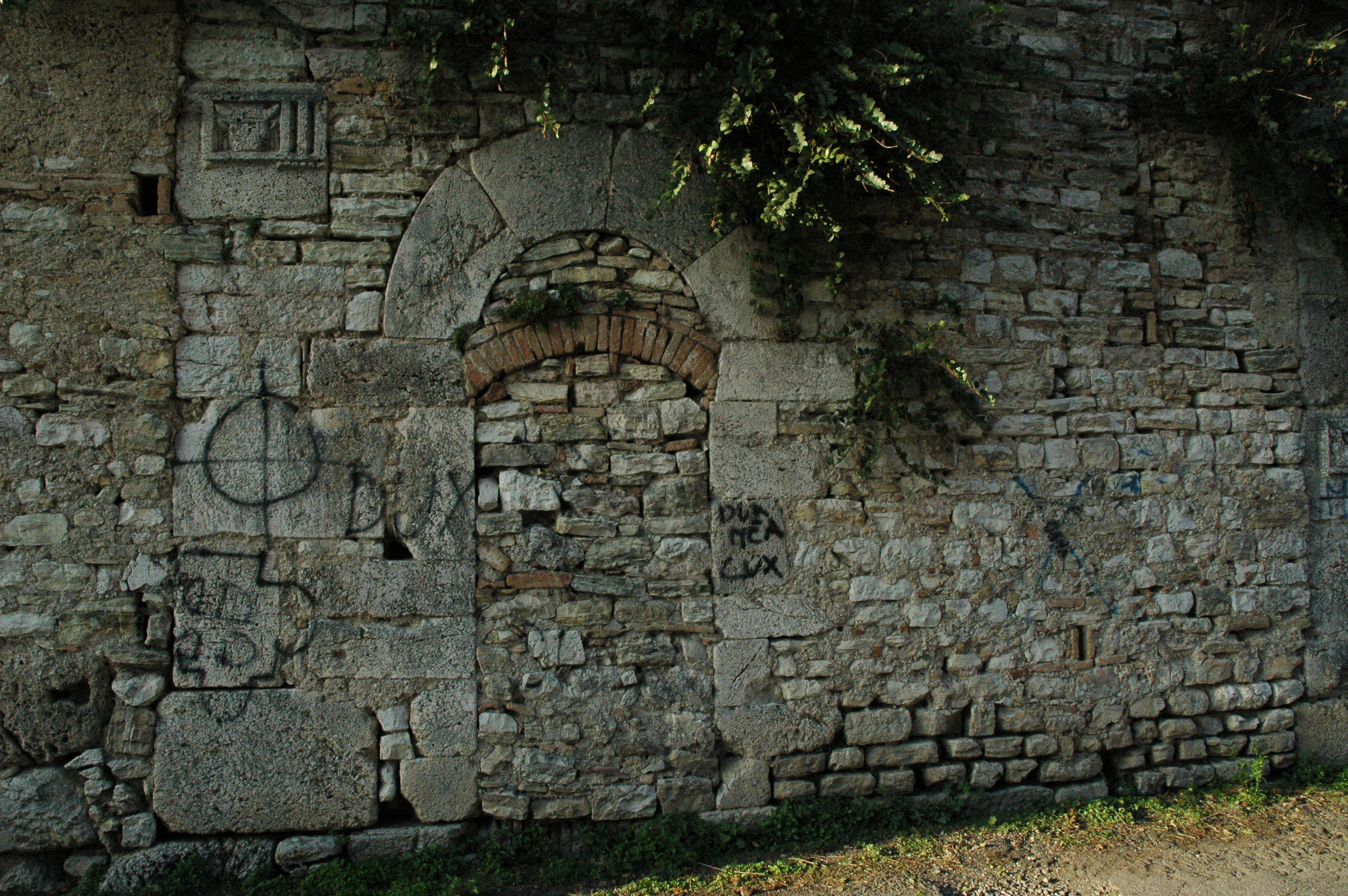 Tratto di Mura Preromane lungo Via delle Felici